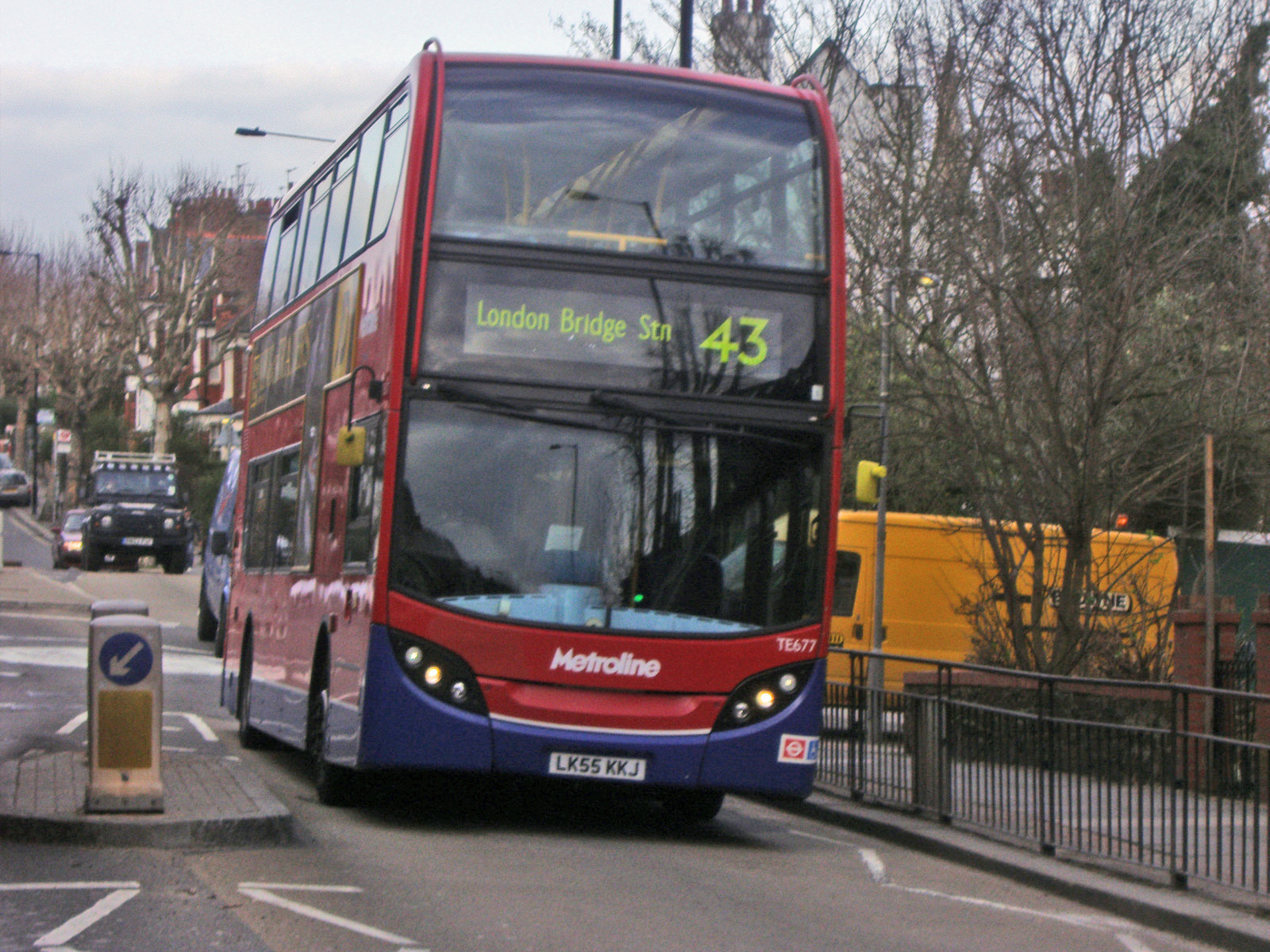 Muswell Hill Rd43